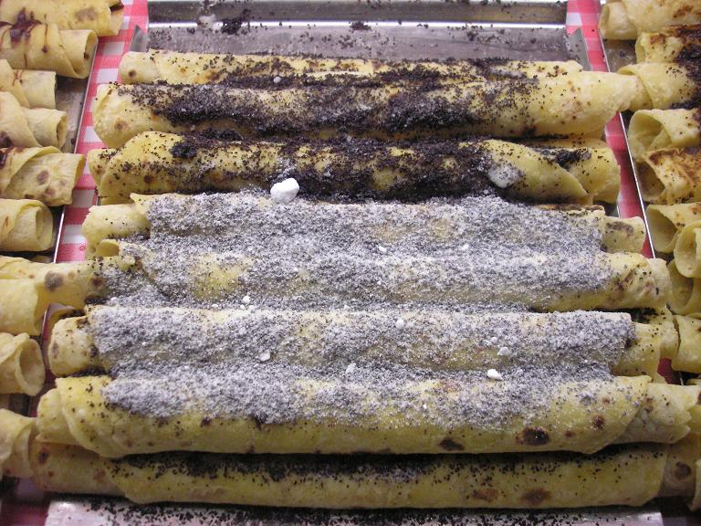 lokse